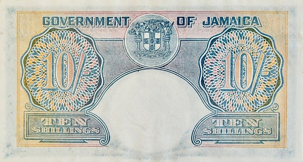 10 shillinges jegy hátoldala.